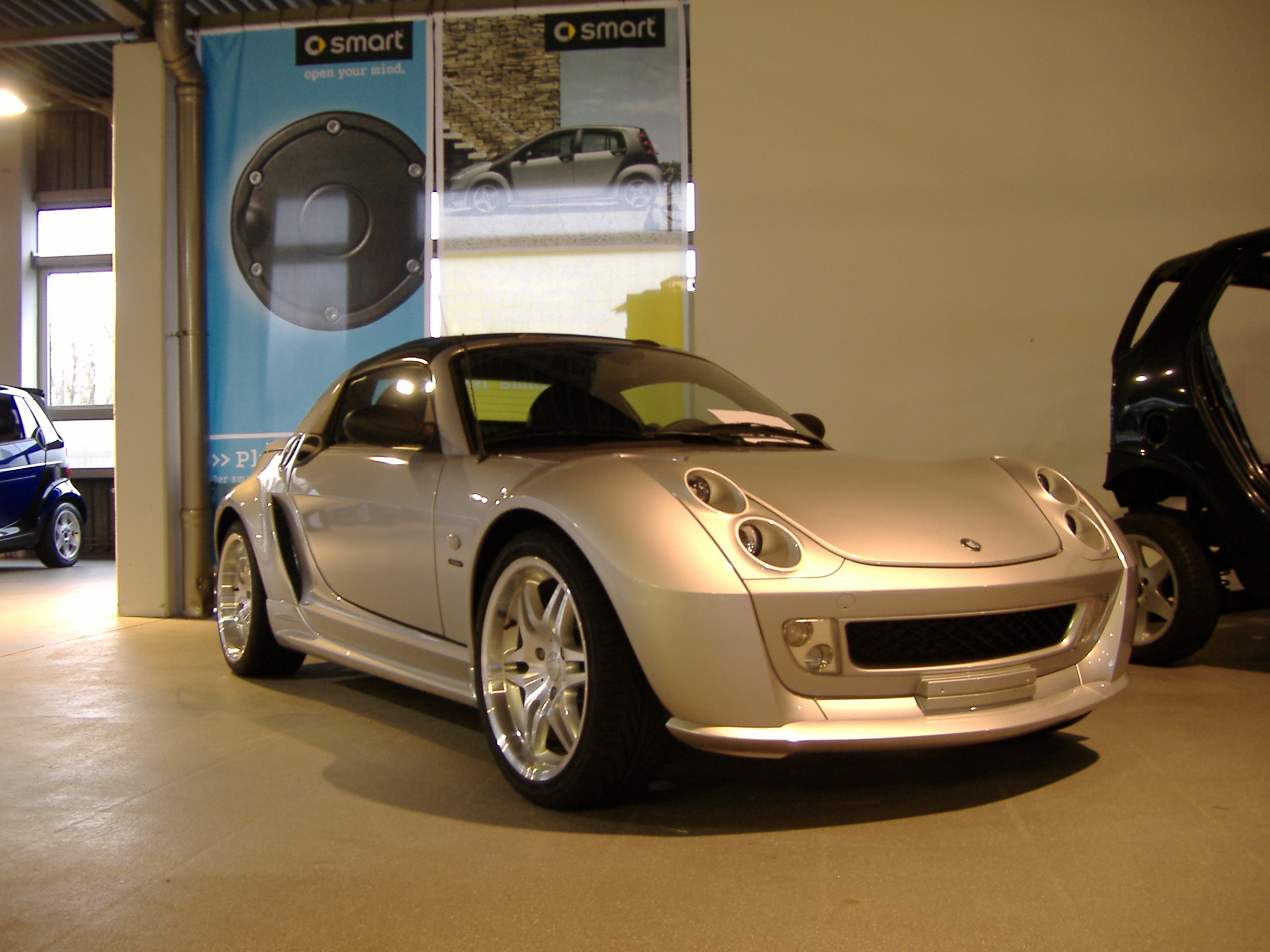 Smart Roadster Brabus